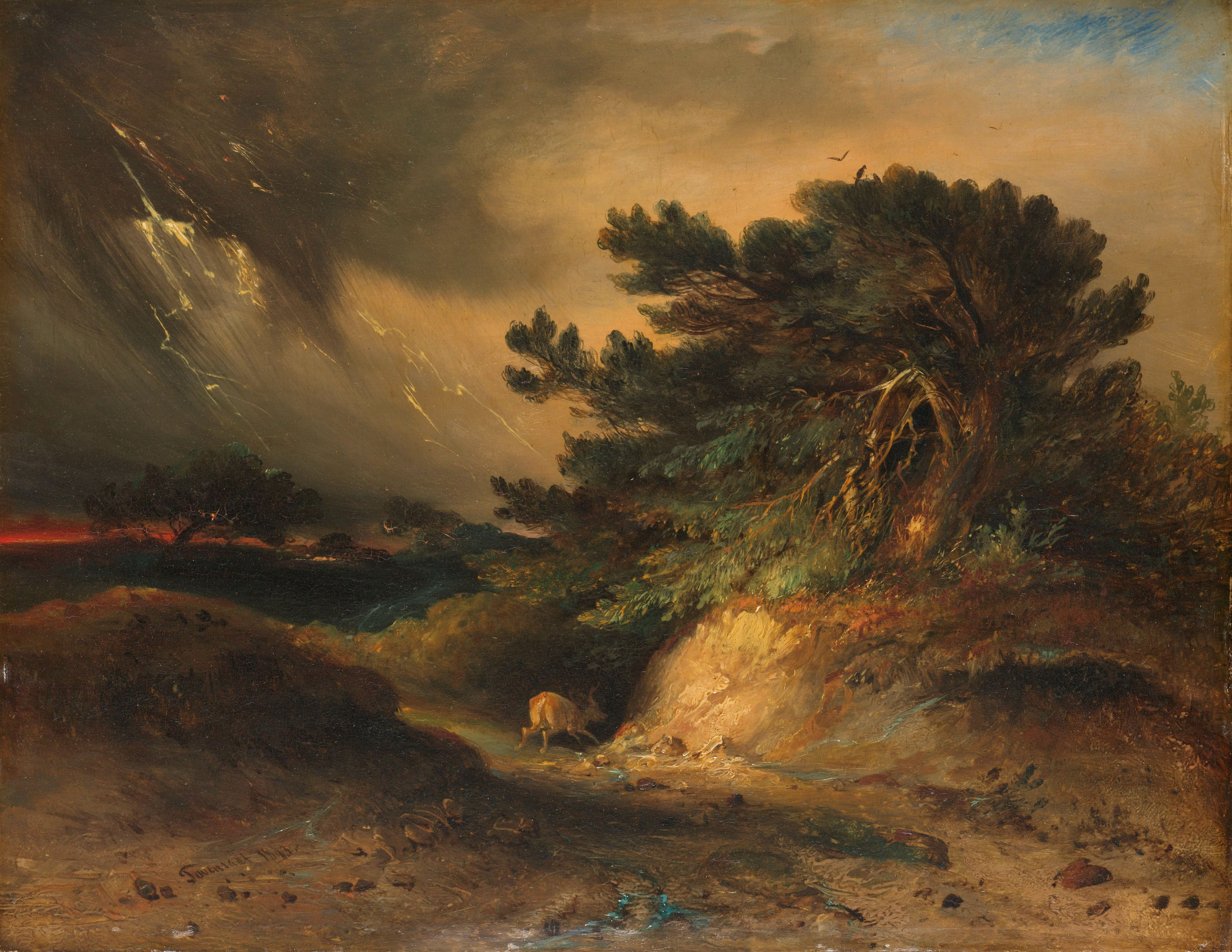 Het onweer. Heidelandschap met een hert dat vlucht voor het losbrekend onweer.; Johannes Tavenraat (1809–1881), olieverf op paneel, 1843